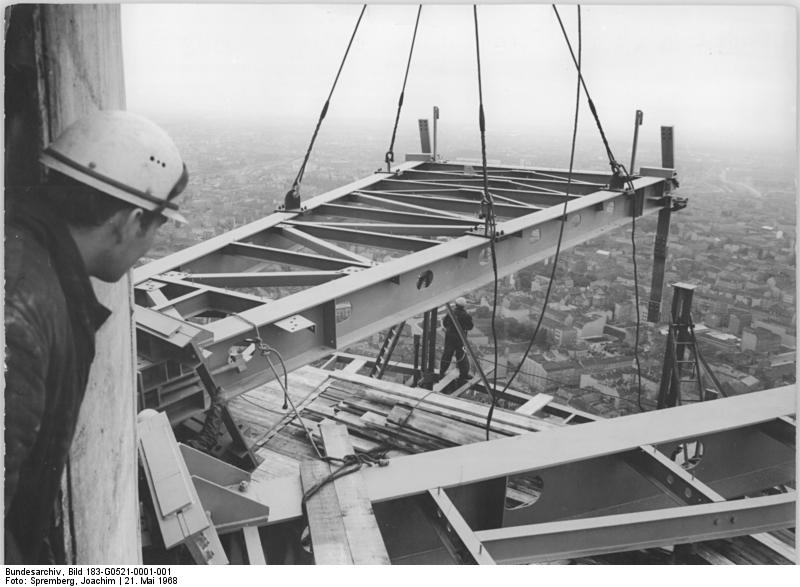 Zentralbild Spremberg 21.5.1968 Berlin: 216 Meter über dem Stadtzentrum Die Turmkugel des Fernsehturms nimmt jetzt stetig Gestalt an. Hier wird ein Kugelsegment für die vierte Bühne montiert - das ist bereits über dem künftigen Turmcafe. 15-25 Minuten je nach den Witterungsbedingungen dauert das Emporhieven eines solchen mächtigen Stahlsegmentes, eine Zeit, die für die präzise Arbeit der Spezialisten aus dem VEB Industriemontagen Leipzig spricht. Und auch diese Zahlen bedürfen keines Kommentares: Rund 350 Tonnen Stahl sind schon mit dem Turmschaft verbunden; nach Abschluß der Montagephase wird die Stahlskelett-Konstruktion ein Gewicht von ca. 550 Tonnen besitzen. Mit Außenhaut und Einrichtungen "wiegt" die Kugel schließlich sogar ca. 5000 Tonnen.